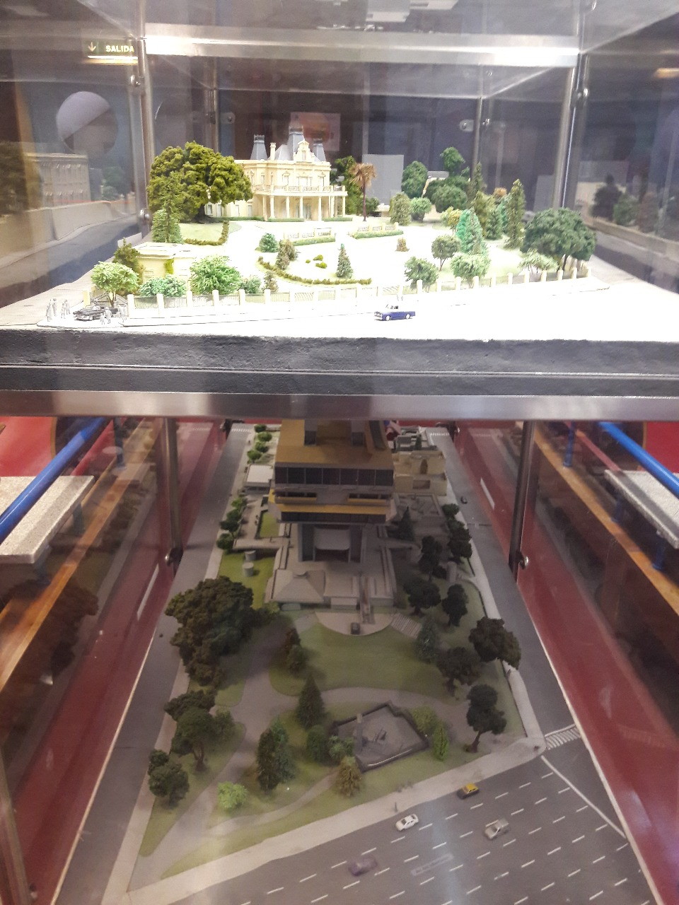 Arriba se encuentra la maqueta del Palacio Unzué y abajo la maqueta de la Biblioteca Nacional